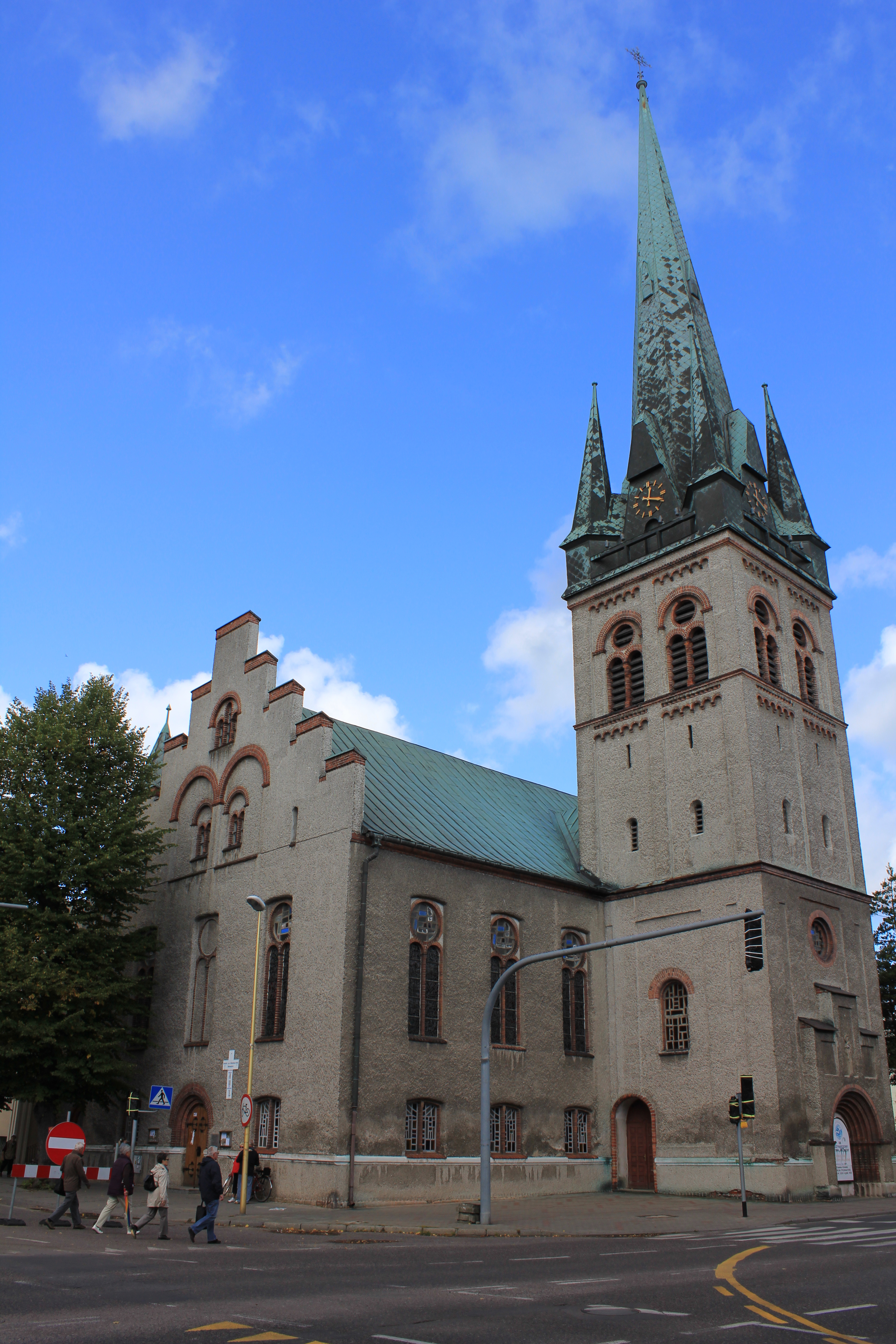 kościół ewang., ob. rzym.-kat. par. p.w. Chrystusa Króla Świnoujście